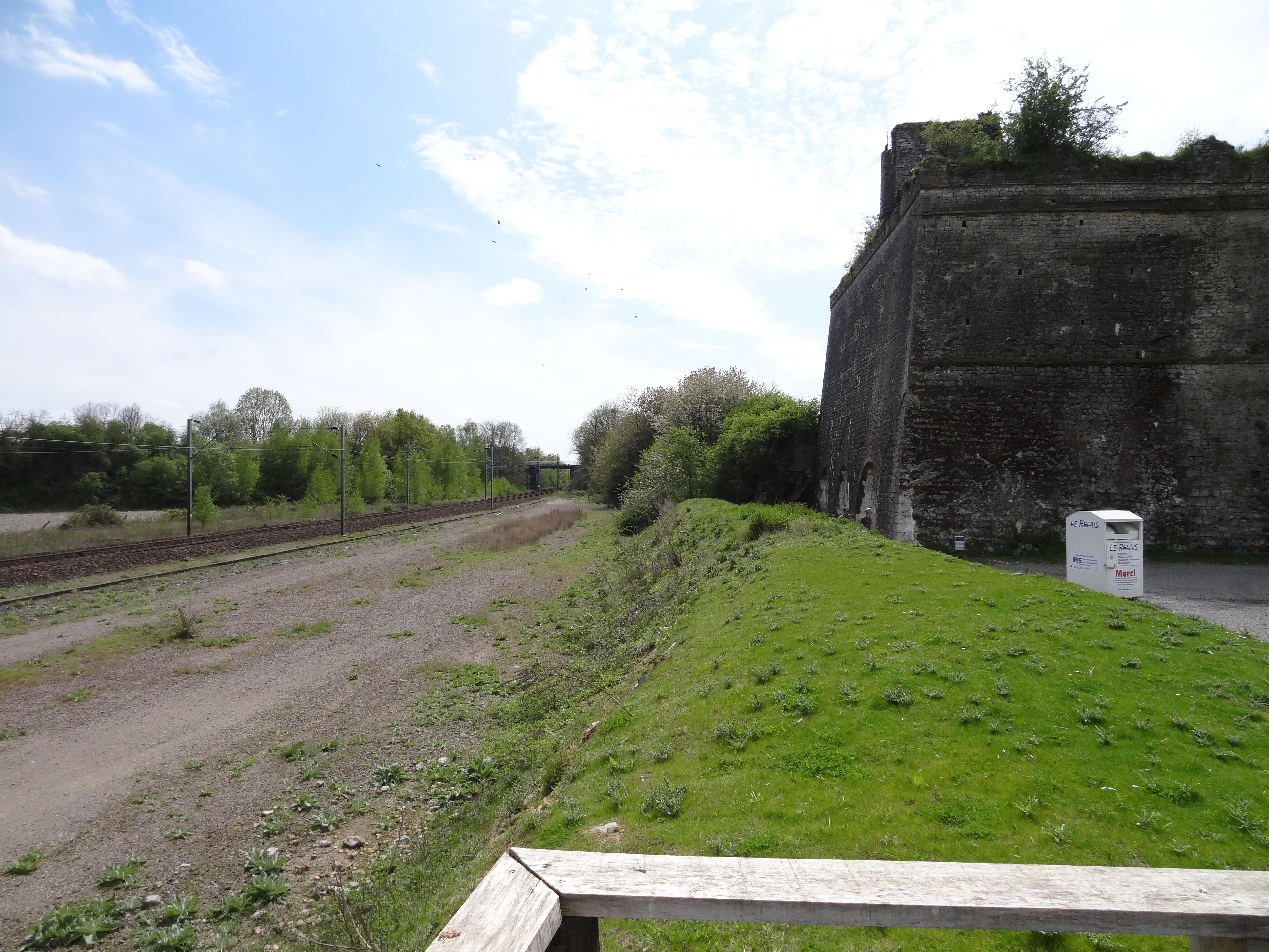 Vue des fours à chaux en sortie de la gare de Louverné (Mayenne)